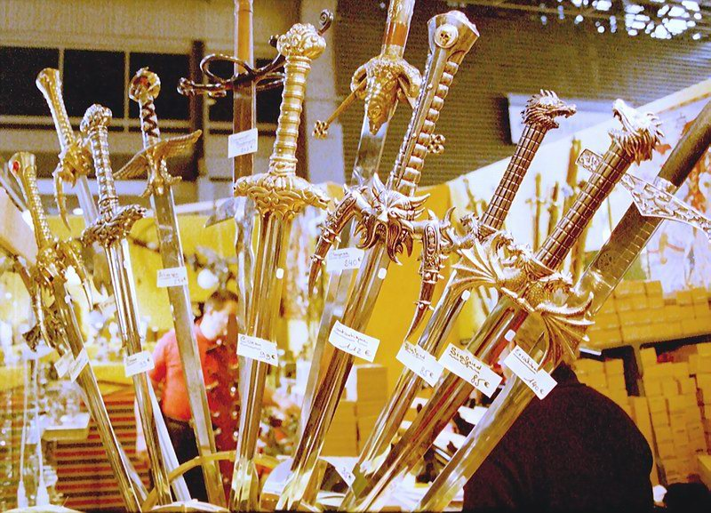 Épées. Auteur: Greudin, fr:2002 Licence: Domaine public 画像:Epees.jpg